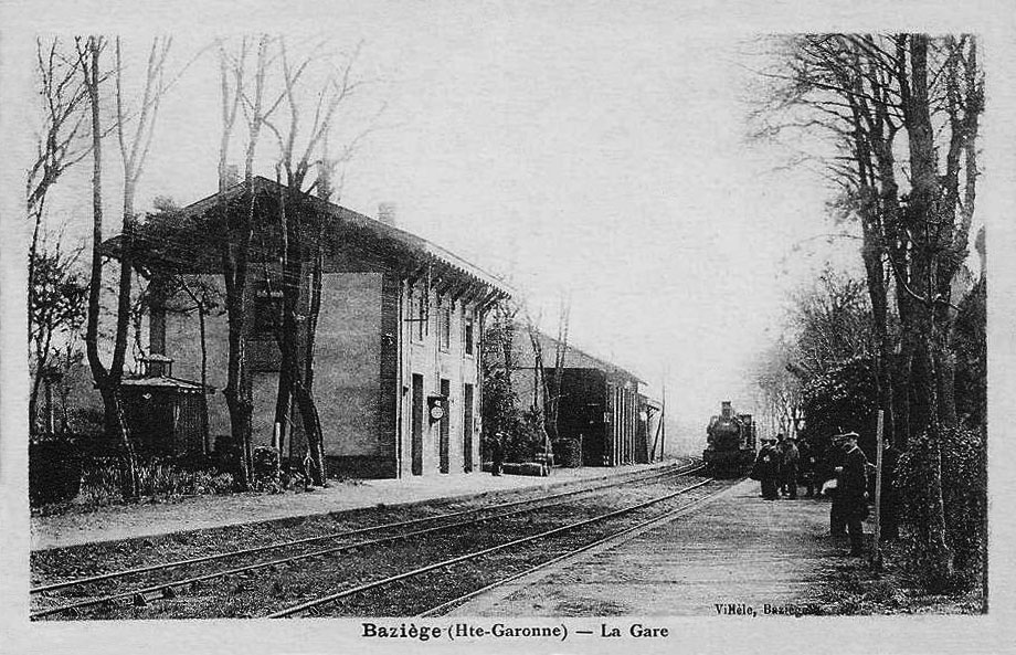 La gare de Baziège (Haute-Garonne, France) au début des années 1900.